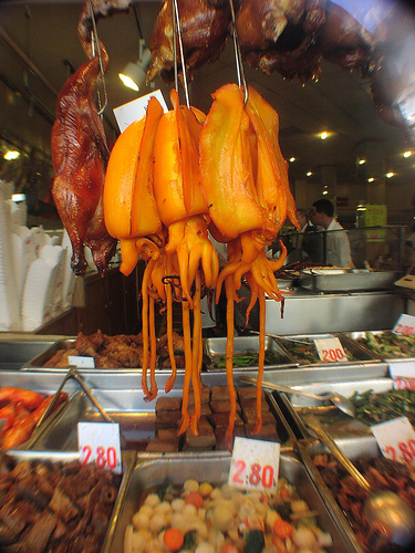 Orange squid cantonese cuisineOrange squid